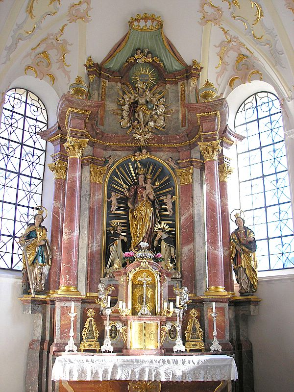 Pfarrkirche Mariä Himmelfahrt (Türkenfeld, Landkreis Fürstenfeldbruck, Oberbayern). Der Hochaltar (1805). Eigene Aufnahme, Febr. 2007 / Parish church "Assumption of Mary" (Tuerkenfeld near Fuerstenfeldbruck, Upper Bavaria, Germany). The high altar (1805). Own photo, Febr. 2007